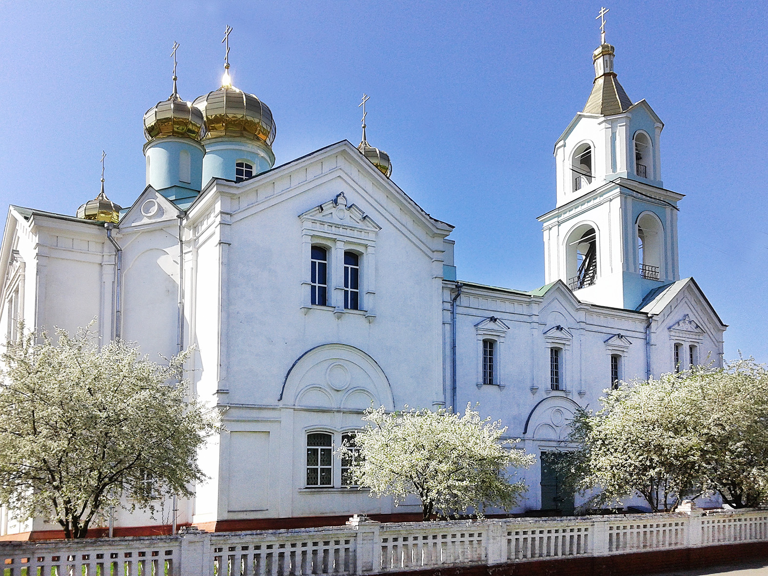 Іванівська церква у Квашинцях (Прилуки).